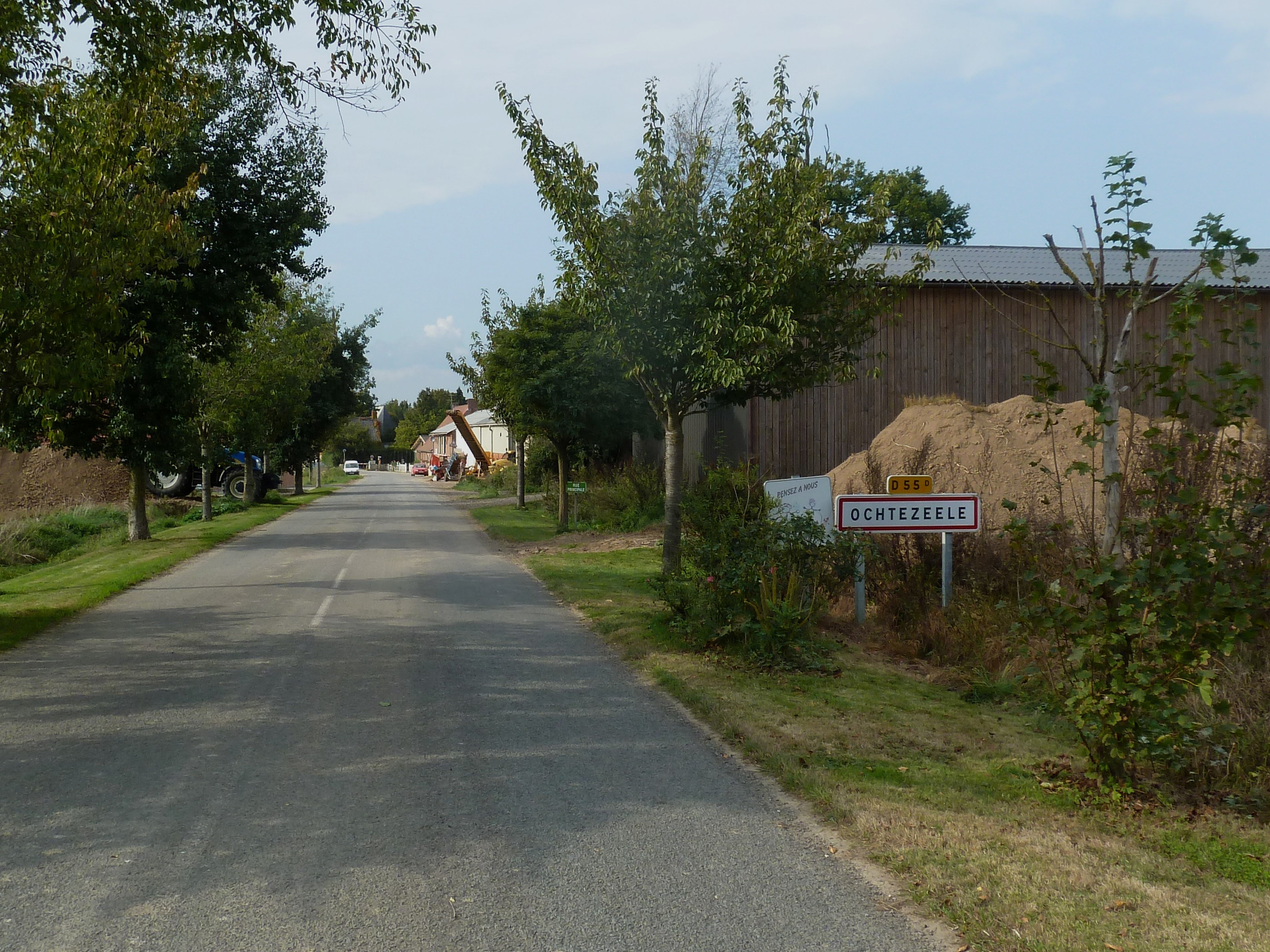 Le panneau à l'entrée d' Ochtezeele dans le Nord Nord-Pas-de-Calais.- France.